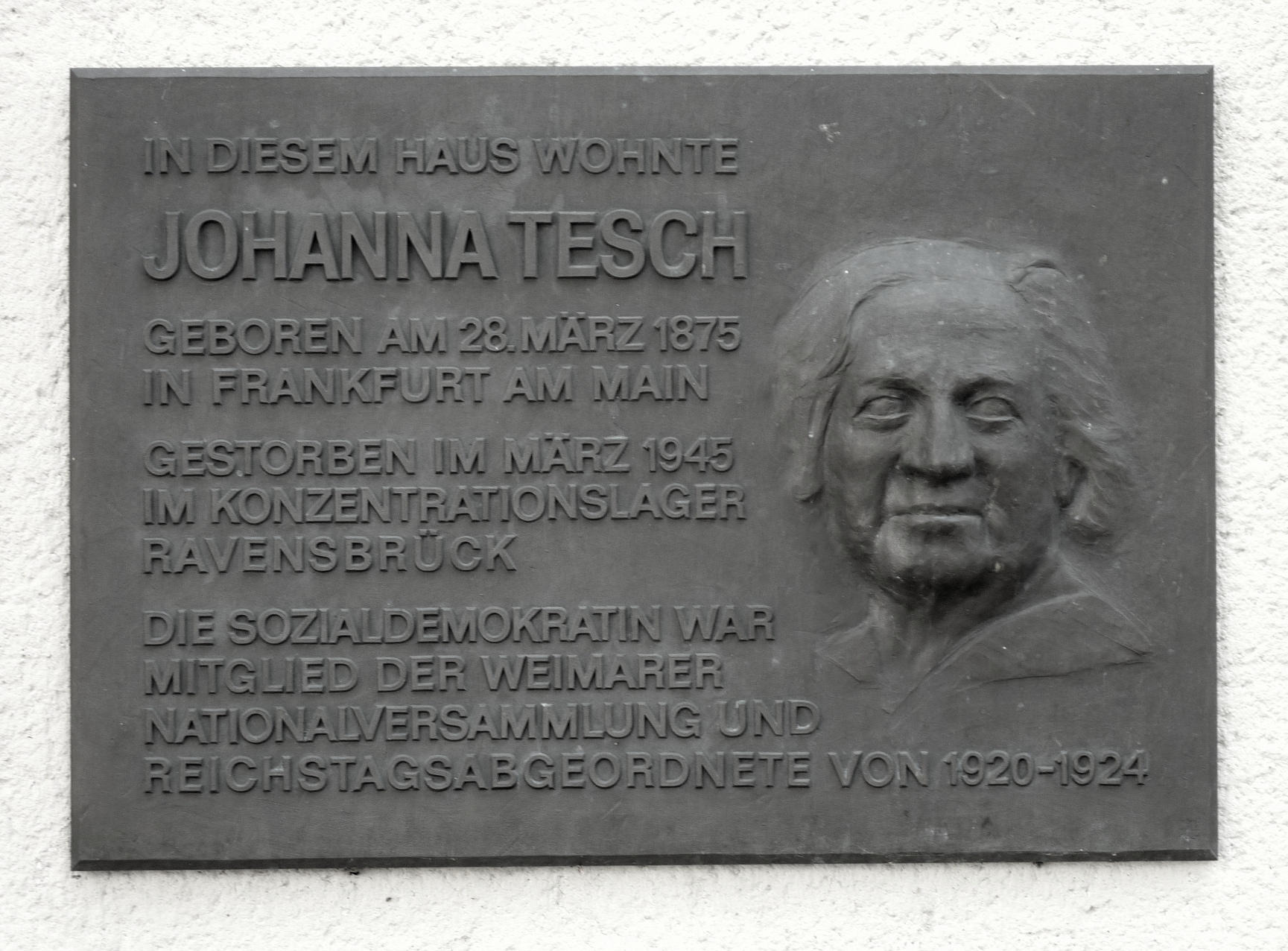 Gedenkplakette für Johanna Tesch (1875–1945) an ihrem Wohnhaus im Stadtteil Riederwald in Frankfurt am Main. Enthüllt am 22. August 1995. Bronzetafel mit Portrait, 50x70 cm, gestaltet von Günter Maniewski. Inschrift der Plakette (Interpunktion hier selbst hinzugefügt): „In diesem Haus wohnte Johanna Tesch, geboren am 28. März 1875 in Frankfurt am Main, gestorben im März 1945 im Konzentrationslager Ravensbrück. Die Sozialdemokratin war Mitglied der Weimarer Nationalversammlung und Reichstagsabgeordnete von 1920–1924.“